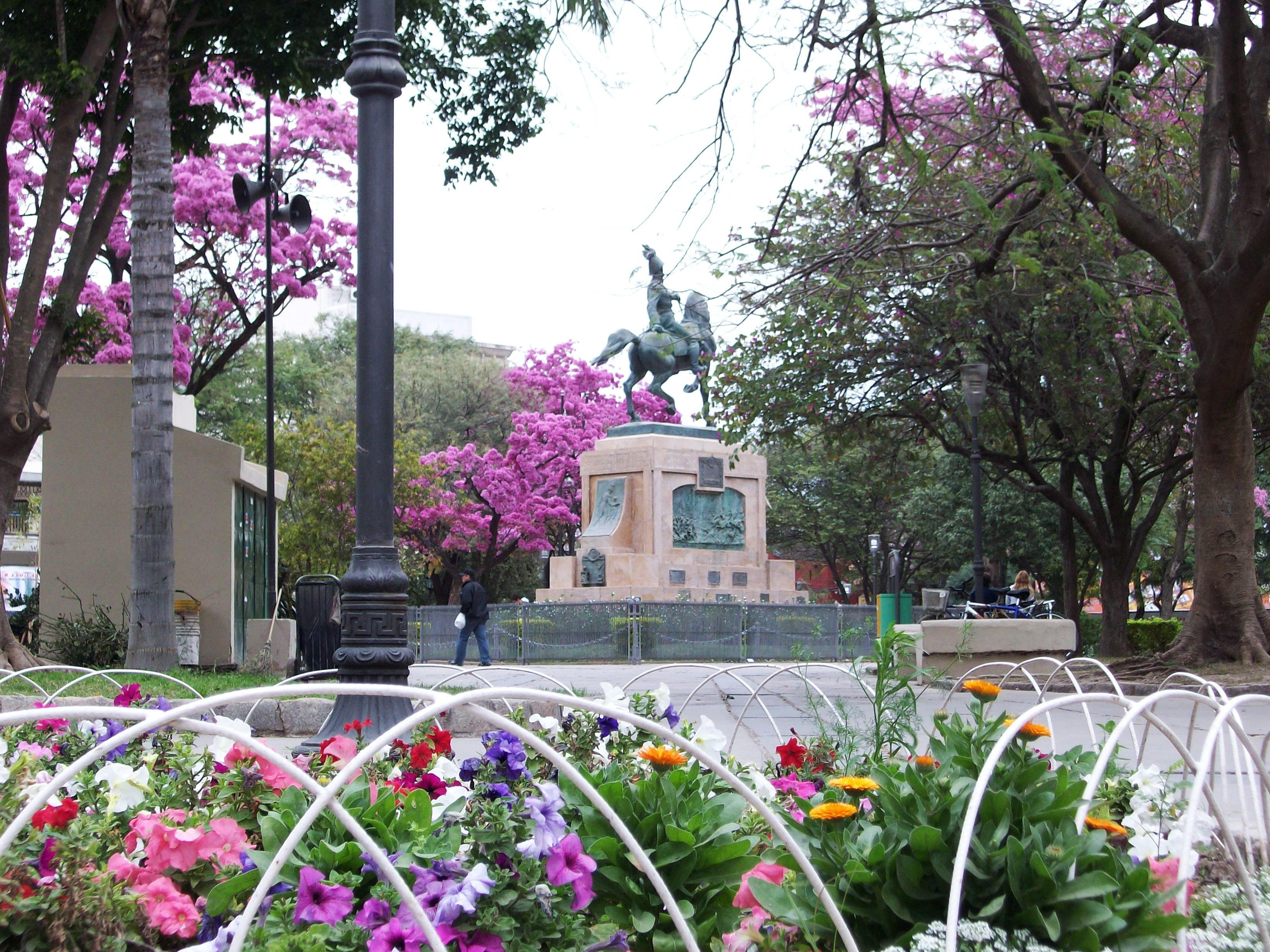 Plaza Libertad de Santiago del Estero, Argentina. Es la plaza principal y centro de la ciudad.